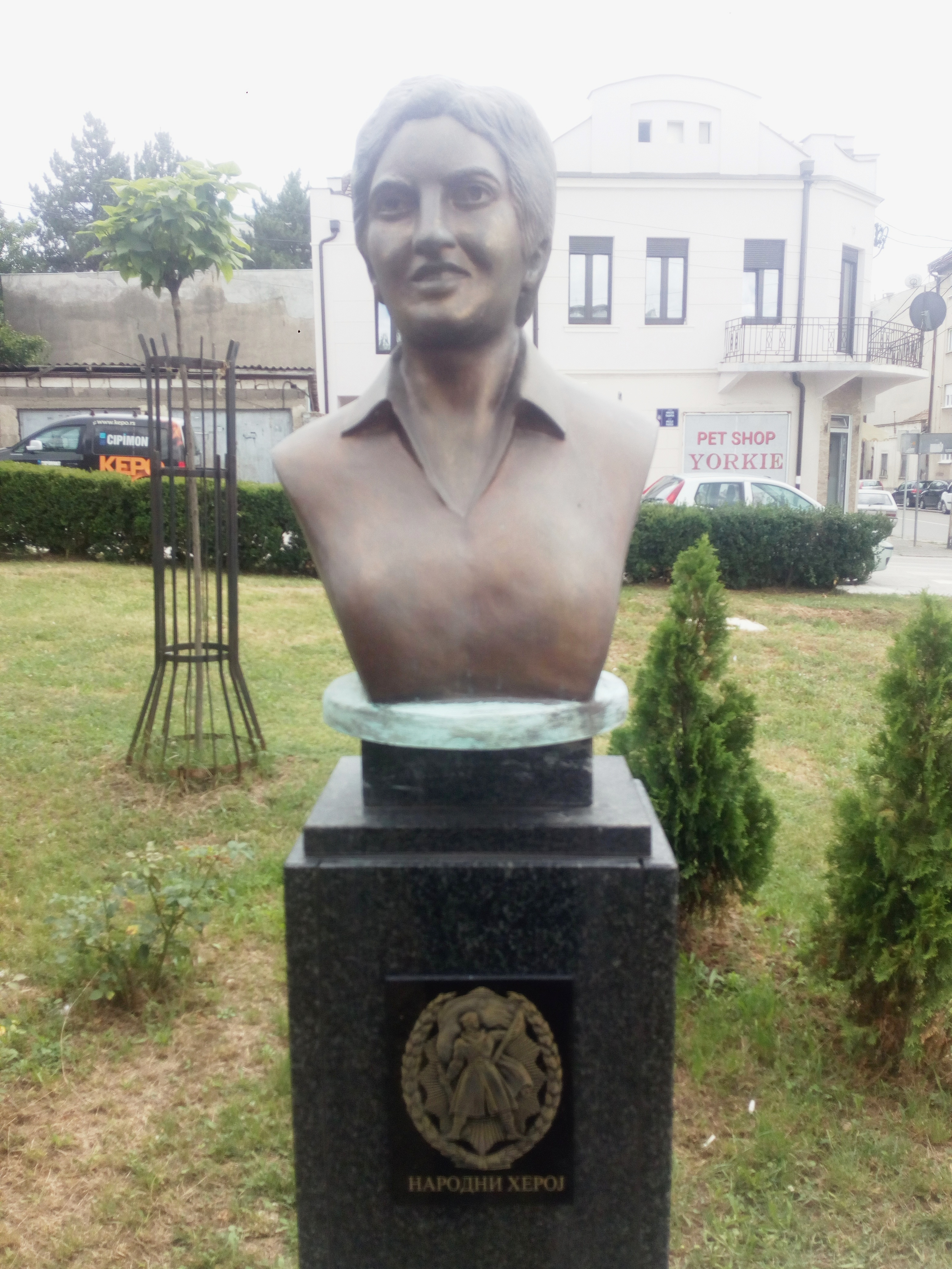 Sromen-bista Božidarke Kike Damnjanović Marković u Mladenovcu